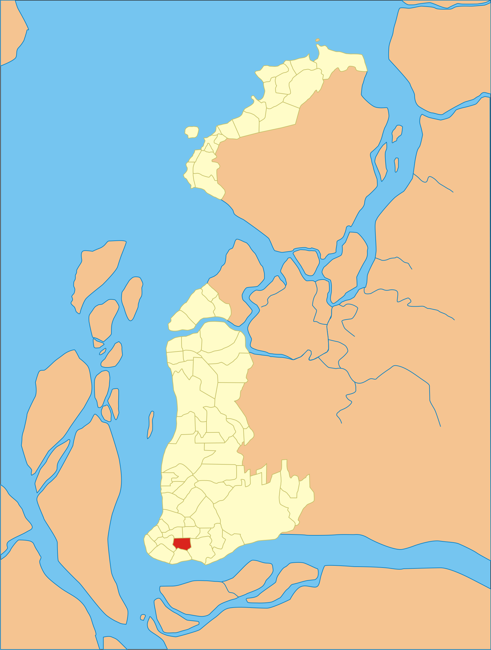 Localização do bairro em Belém do Pará